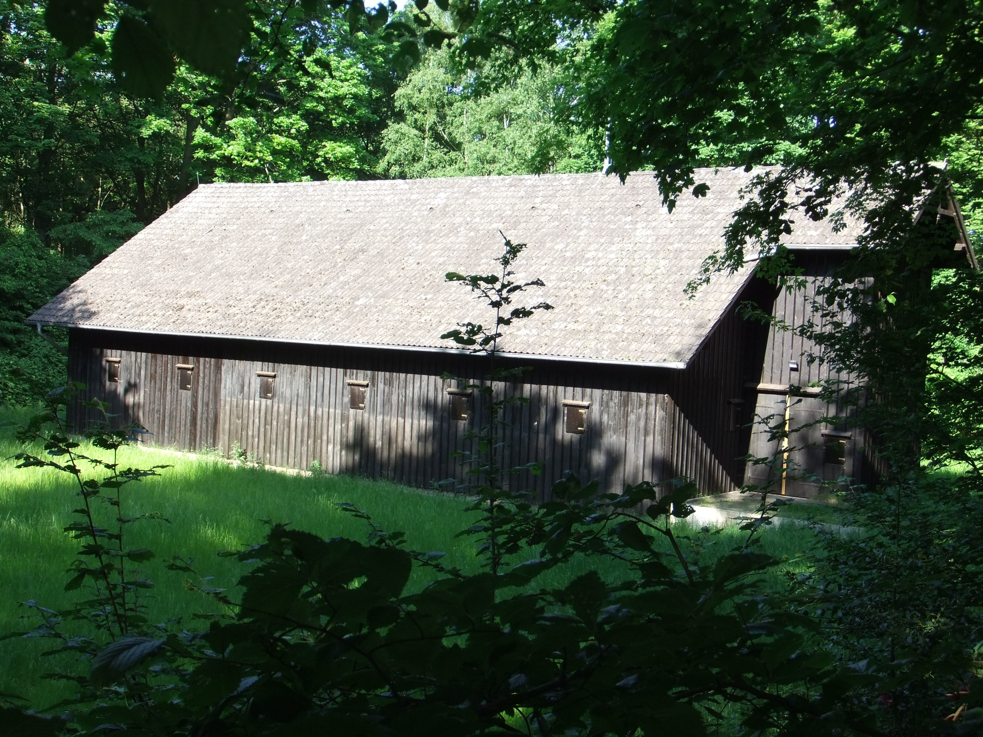 Pulvermagazin Speckenbüttel in Bremerhaven, Siebenbergensweg 65. Das abgebildete Objekt ist ein geschütztes Kulturdenkmal in der Freien Hansestadt Bremen, mit der Nr. 3163 beim Landesamt für Denkmalpflege registriert.